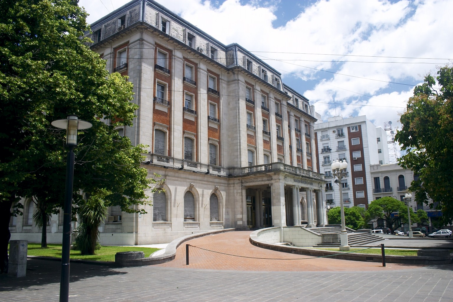 Tribunales Federales de La Plata, Argentina. Construido en 1952, este edificio fue hasta 1978 el Hotel Provincial; fue reinaugurado como tribunales en 1982.